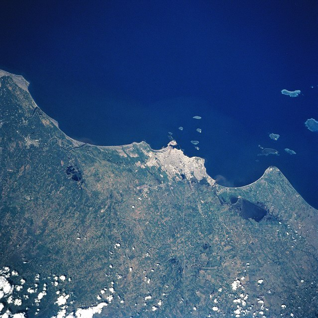 Vista satelital de la ciudad y puerto de Veracruz, Veracruz, México